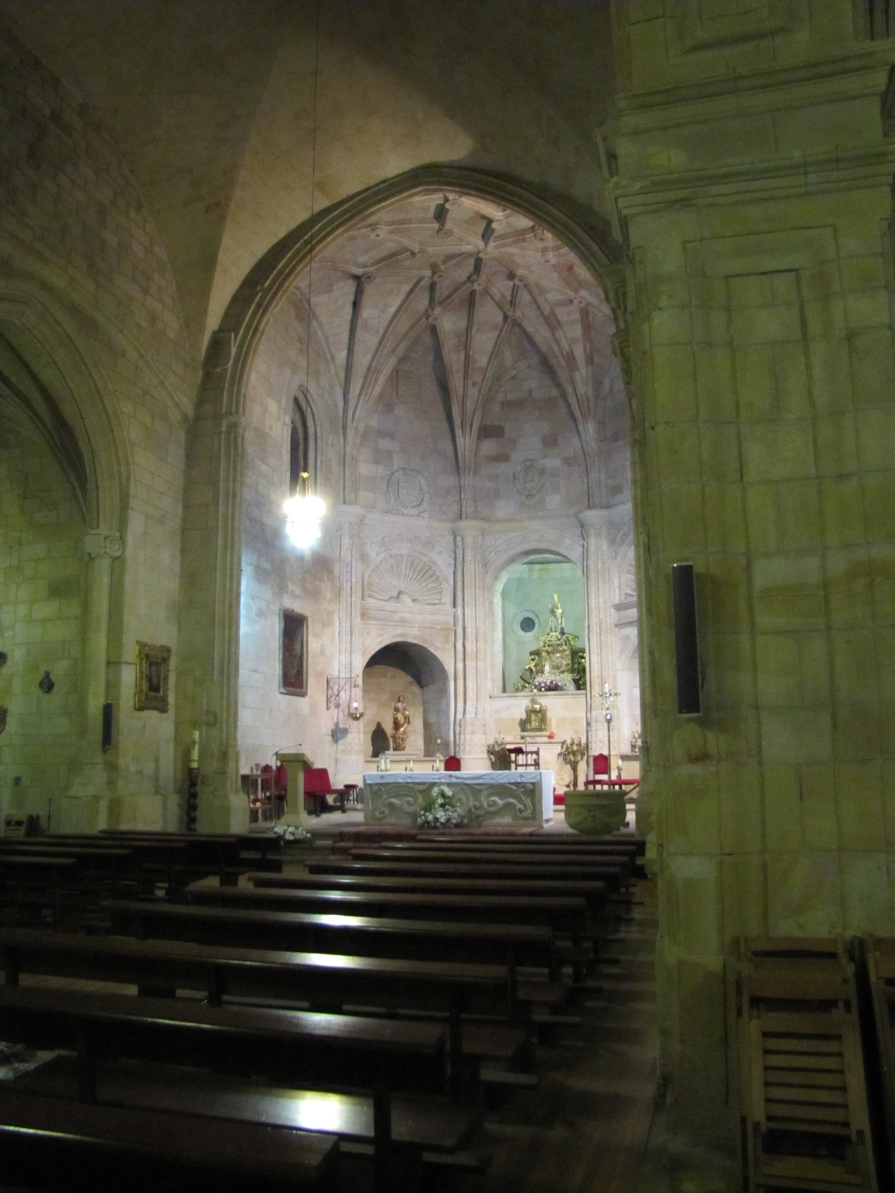 Interior Iglesia de Nuestra Señora del Espino Soria.